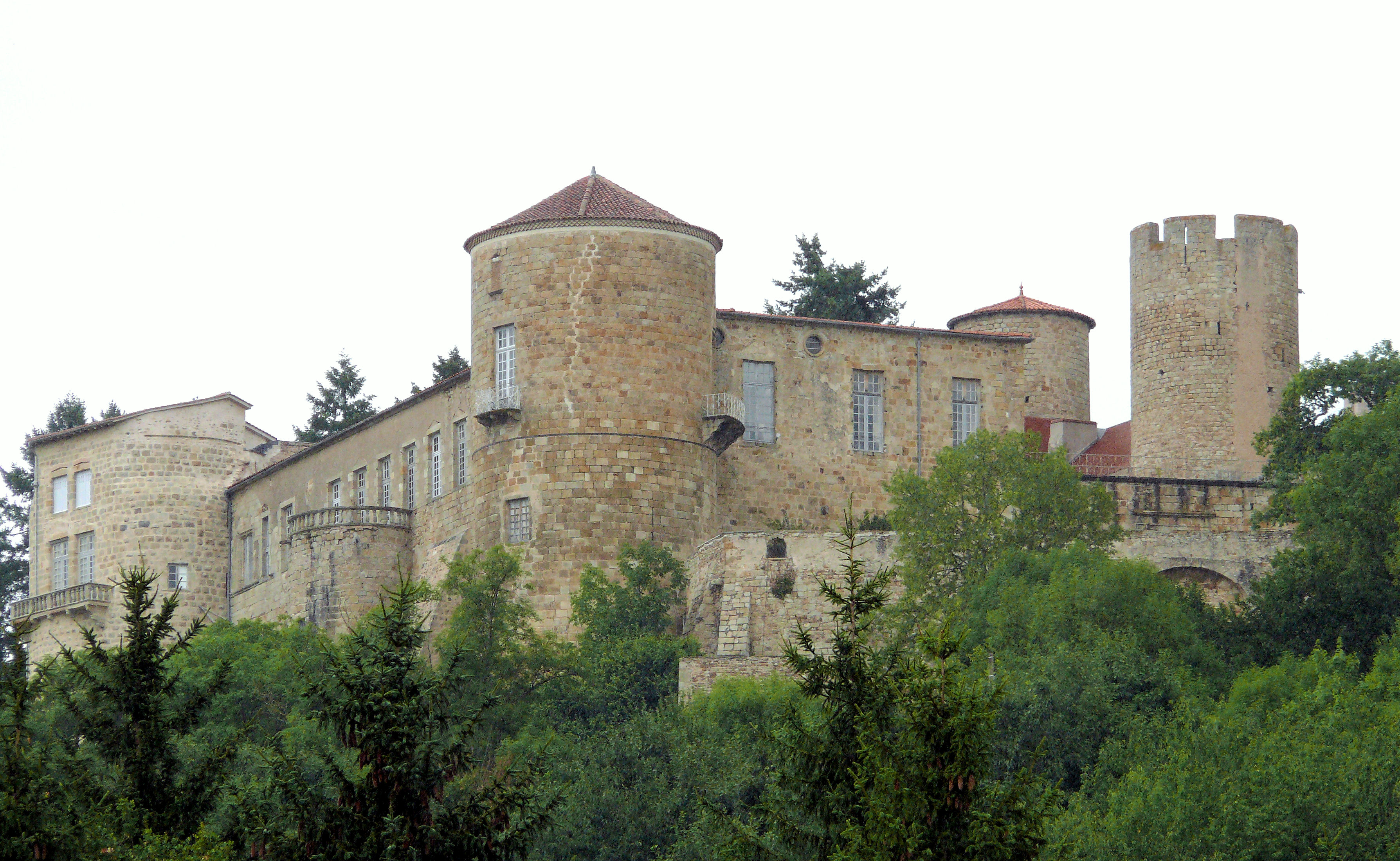 Château de Ravel vu du village